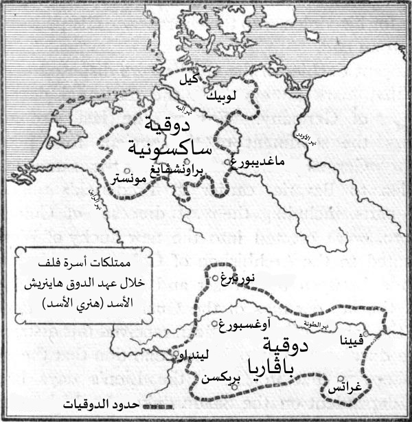 خريطة تُظهر الأراضي التابعة لِأُسرة فلف خِلال عهد الدوق هاينريش الأسد.